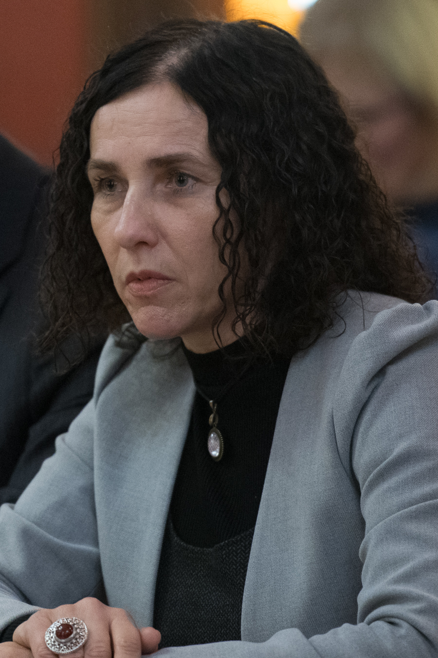 2018.gada 21.novembris. Uz pirmo sēdi sanākusī Ilgtspējīgas attīstības komisija ievēl savu vadību. Foto: Ernests Dinka, Saeima Izmantošanas noteikumi: saeima.lv/lv/autortiesibas